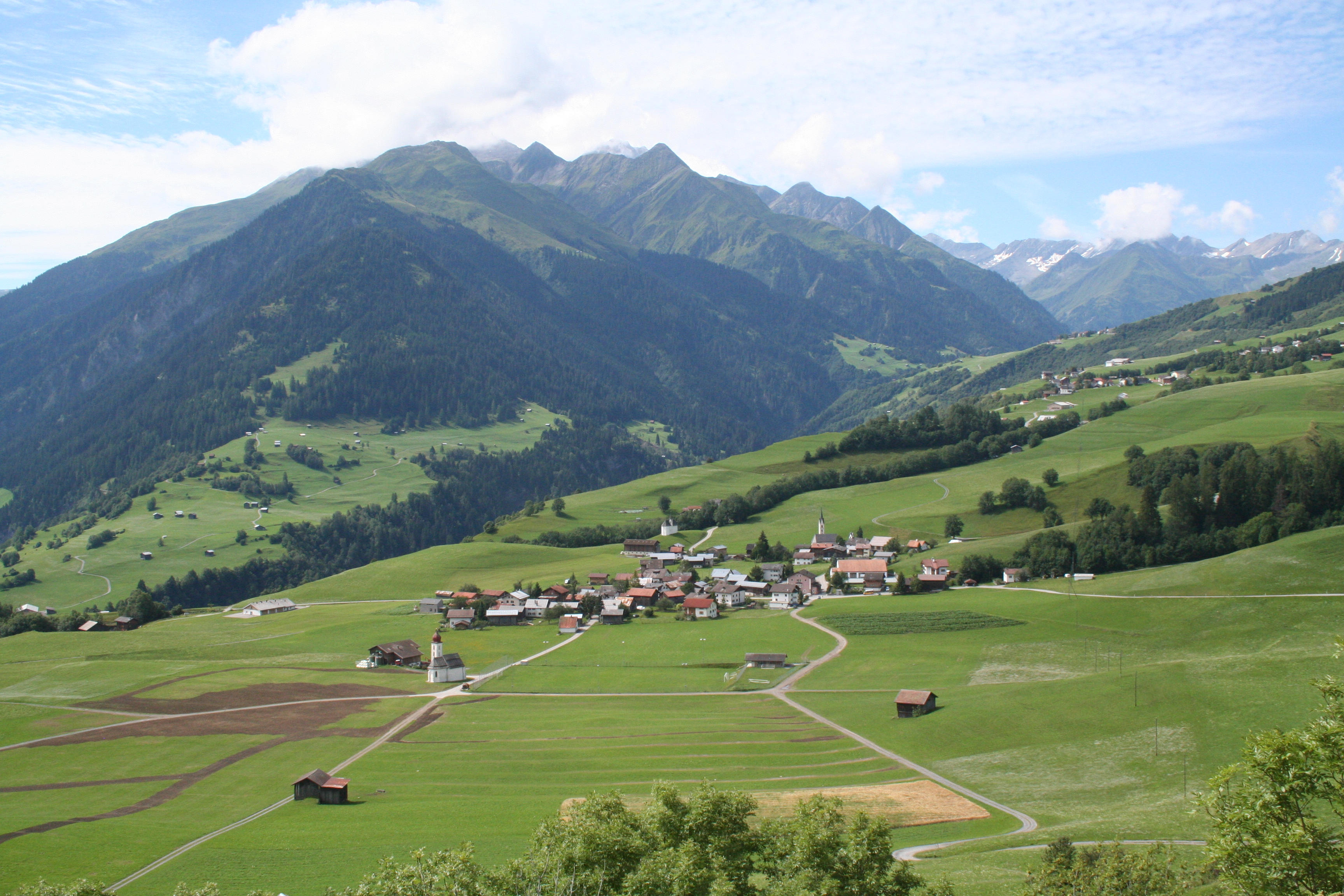 Degen GR Blick nach W